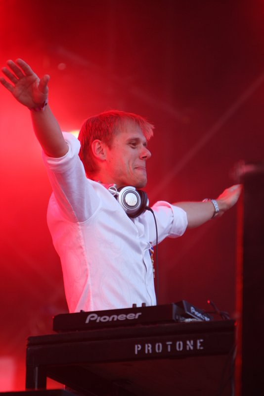 Nederlandse DJ